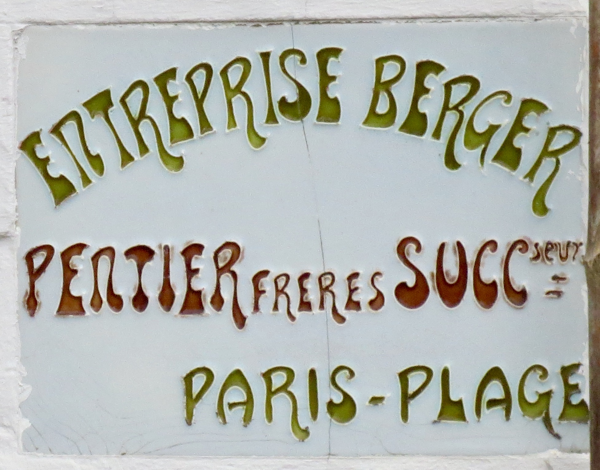 Le Touquet-Paris-Plage - Plaque d'entrepreneur - Entreprise Berger Pentier Frères Successeurs Paris-Plage.